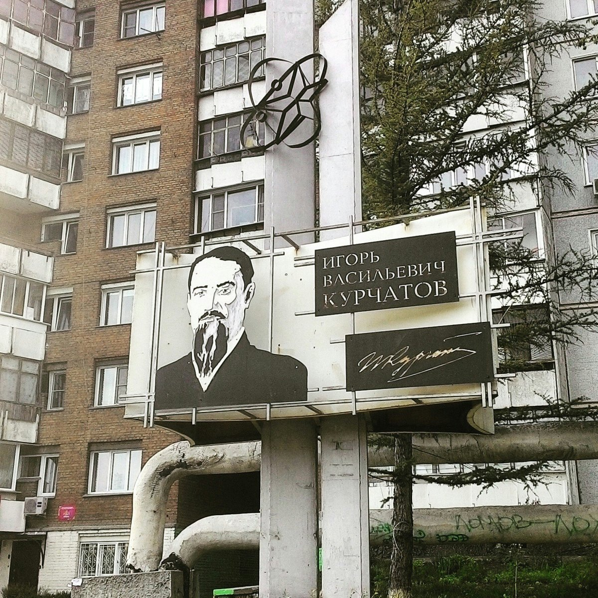 Стела И.В. Курчатова установлена в Новосибирске вблизи центральной арки дома номер 3 по улице Курчатова